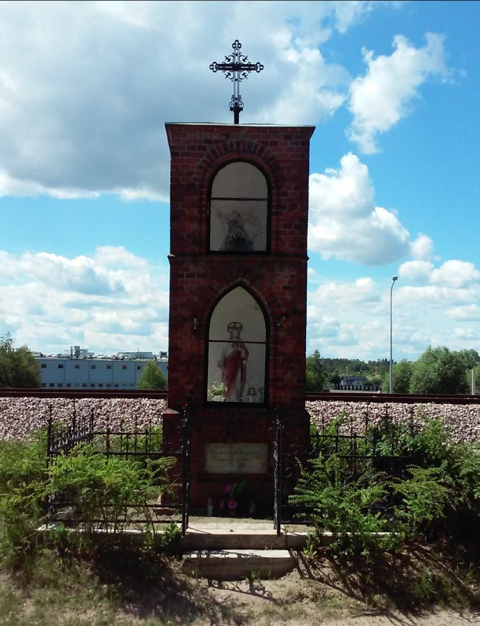 Kapliczka ufundowana w 1902 roku przez Bractwo Serca Jezusowego w Gdańsku Matarni koło kościoła p. w. św. Walentego. Za kapliczką tory Pomorskiej Kolei Metropolitalnej, w tle budynki przemysłowe.